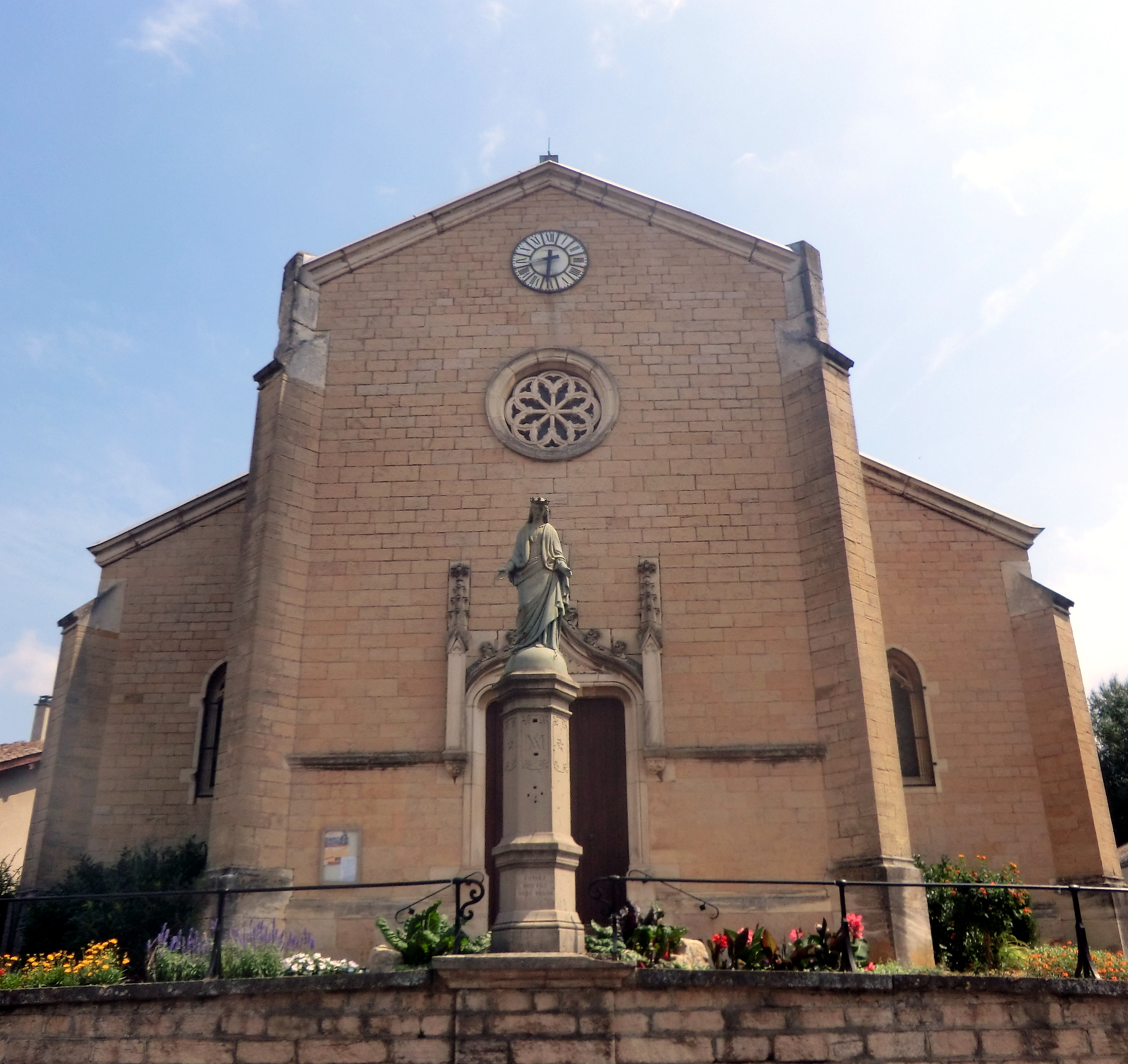 Église de Misérieux.